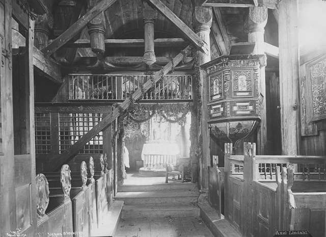 Urnes stavkyrkje, interiør (Interiors of Urnes stave church, Urnes, Luster kommune, Sogn og Fjordane fylke, Norway). Picture taken 1880's - 1890's.